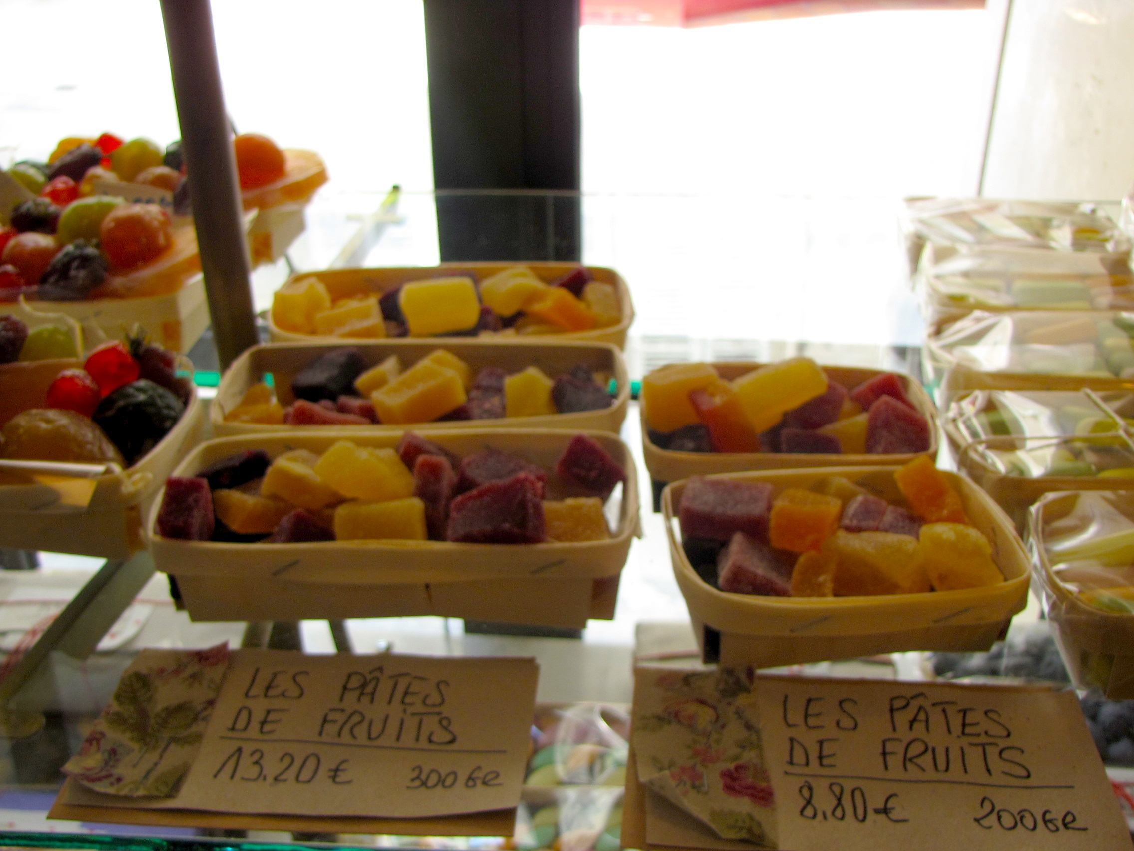 Pâtes de fruits du Comtat